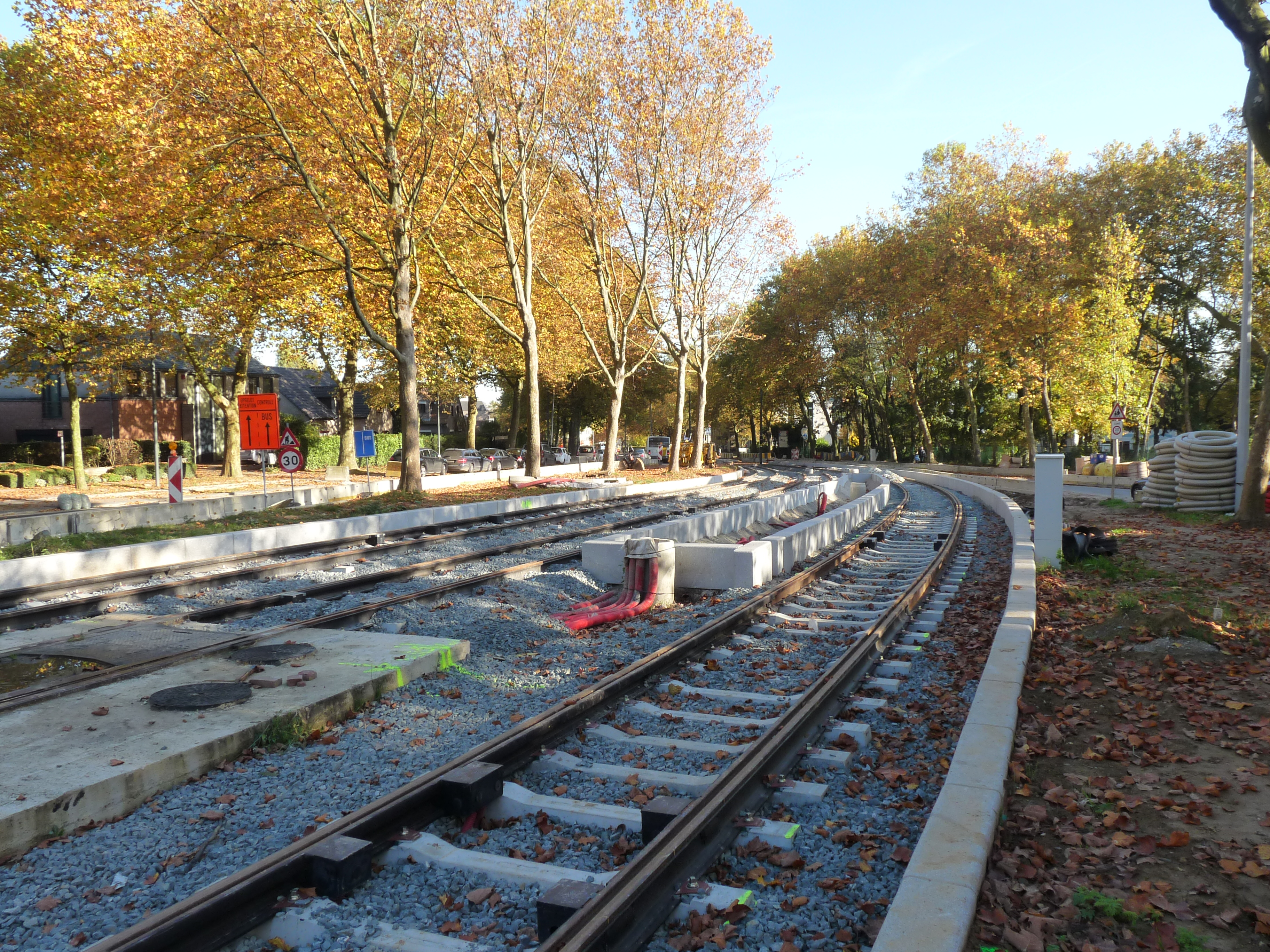 Aanleg van tramlijn 9 in de Dikke Beuklaan